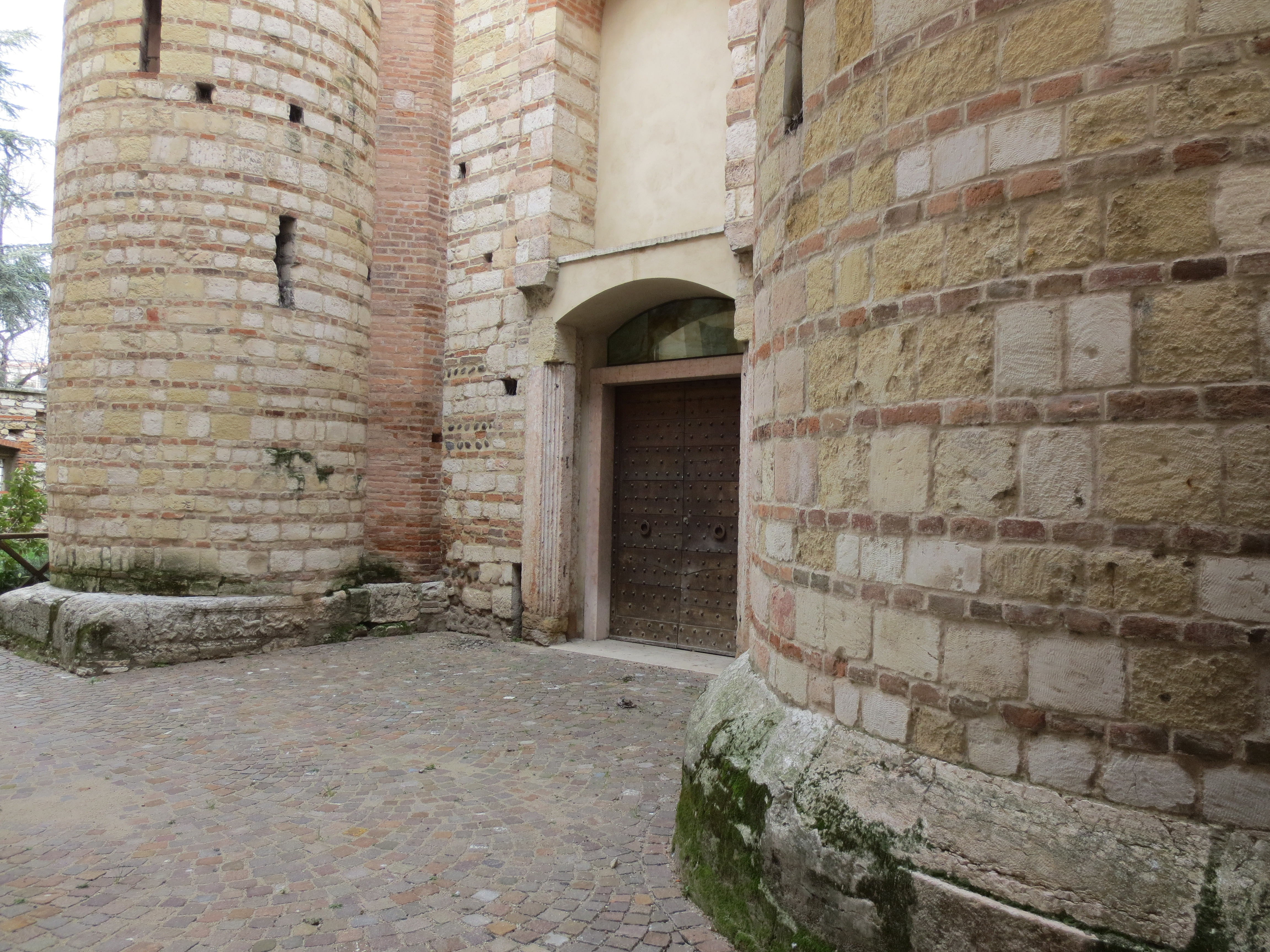 Foto del portale della chiesa di San Lorenzo (Verona)